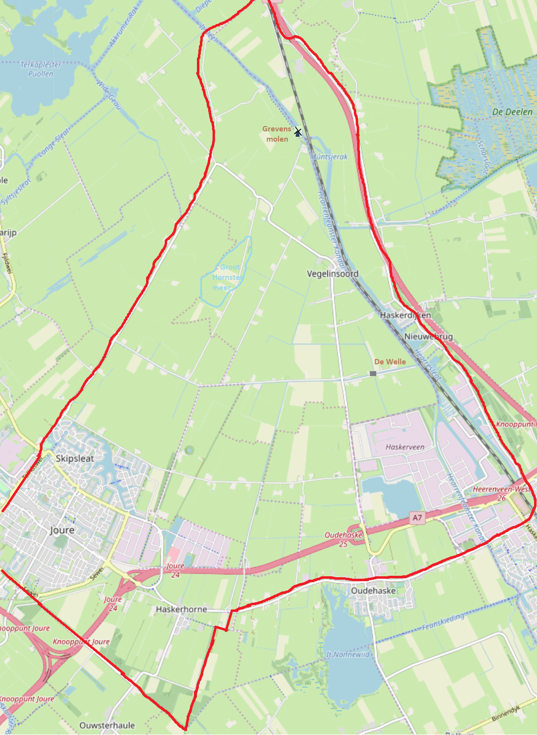 Haskerveenpolder, voormalig waterschap in Friesland, kaart op basis van OpenStreetMap